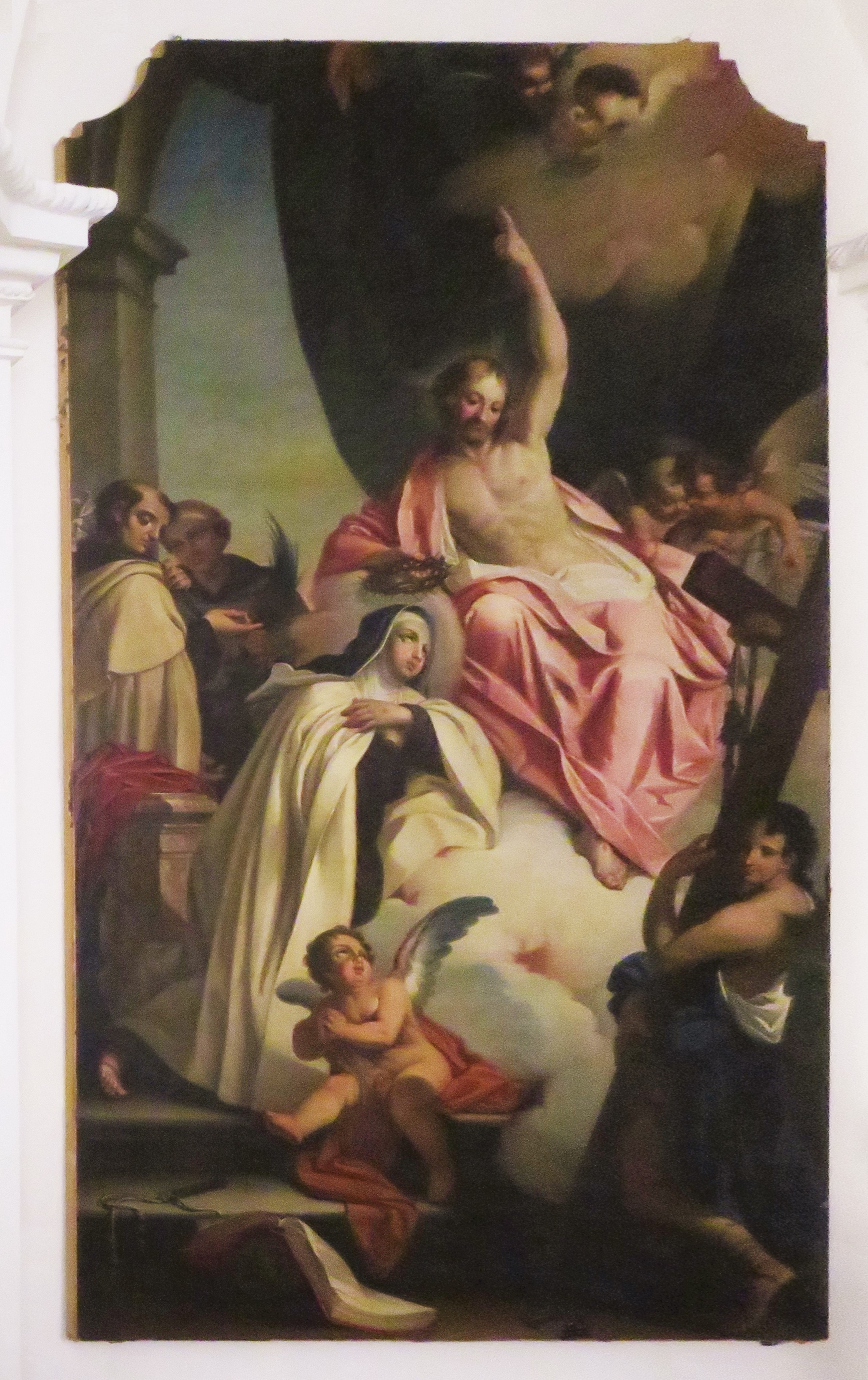 Pala altare della chiesa di Santa Croce distrutta nel 1915 e salvata portandola in Santa Maria del Carmine dove si trova attualmente, nella piccola cappella a destra dell'altare maggiore